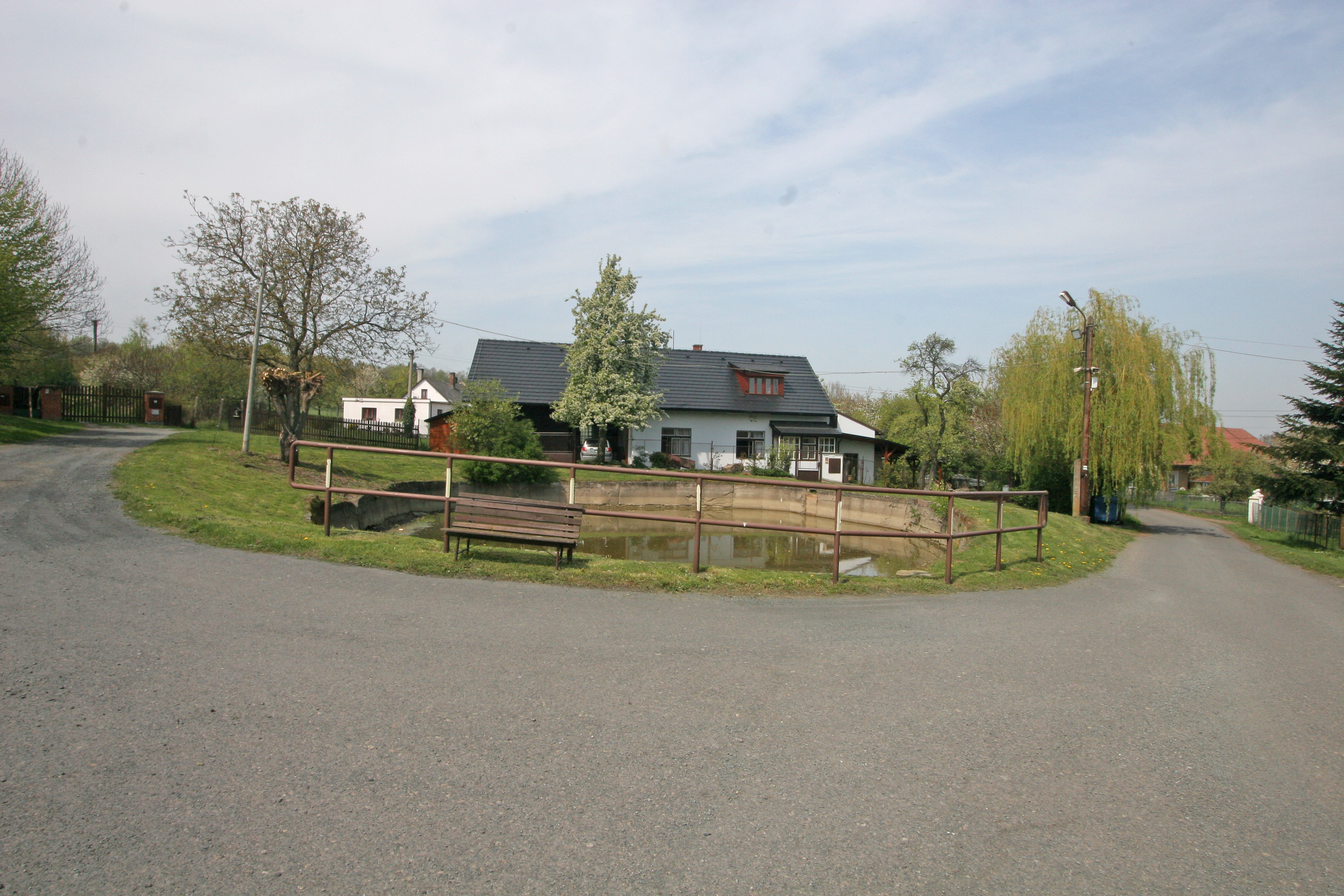 Radlín požární nádrž